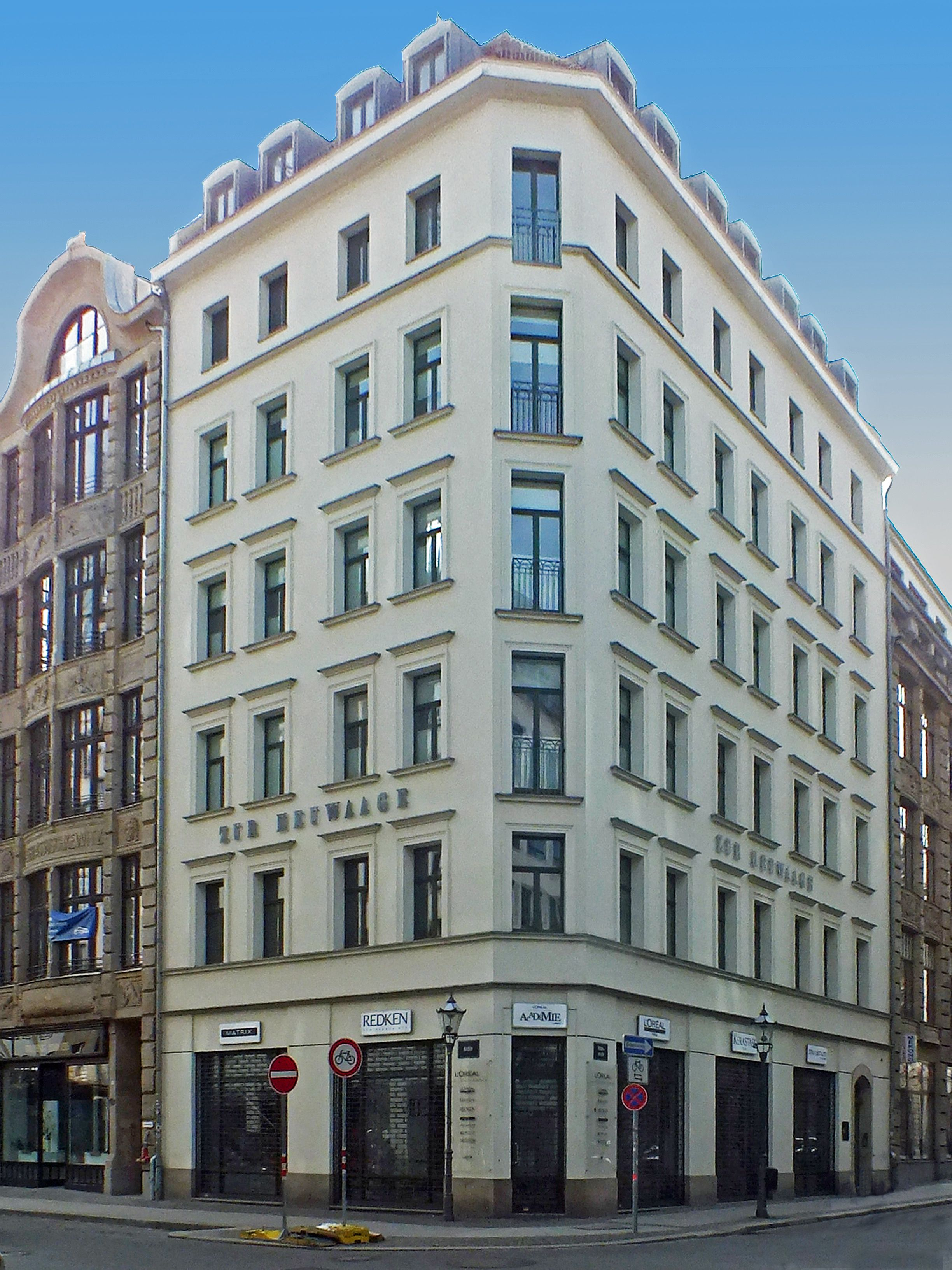 Wohn- und Geschäftshaus „Zur Heuwaage“, Ritterstraße 50 in Leipzig